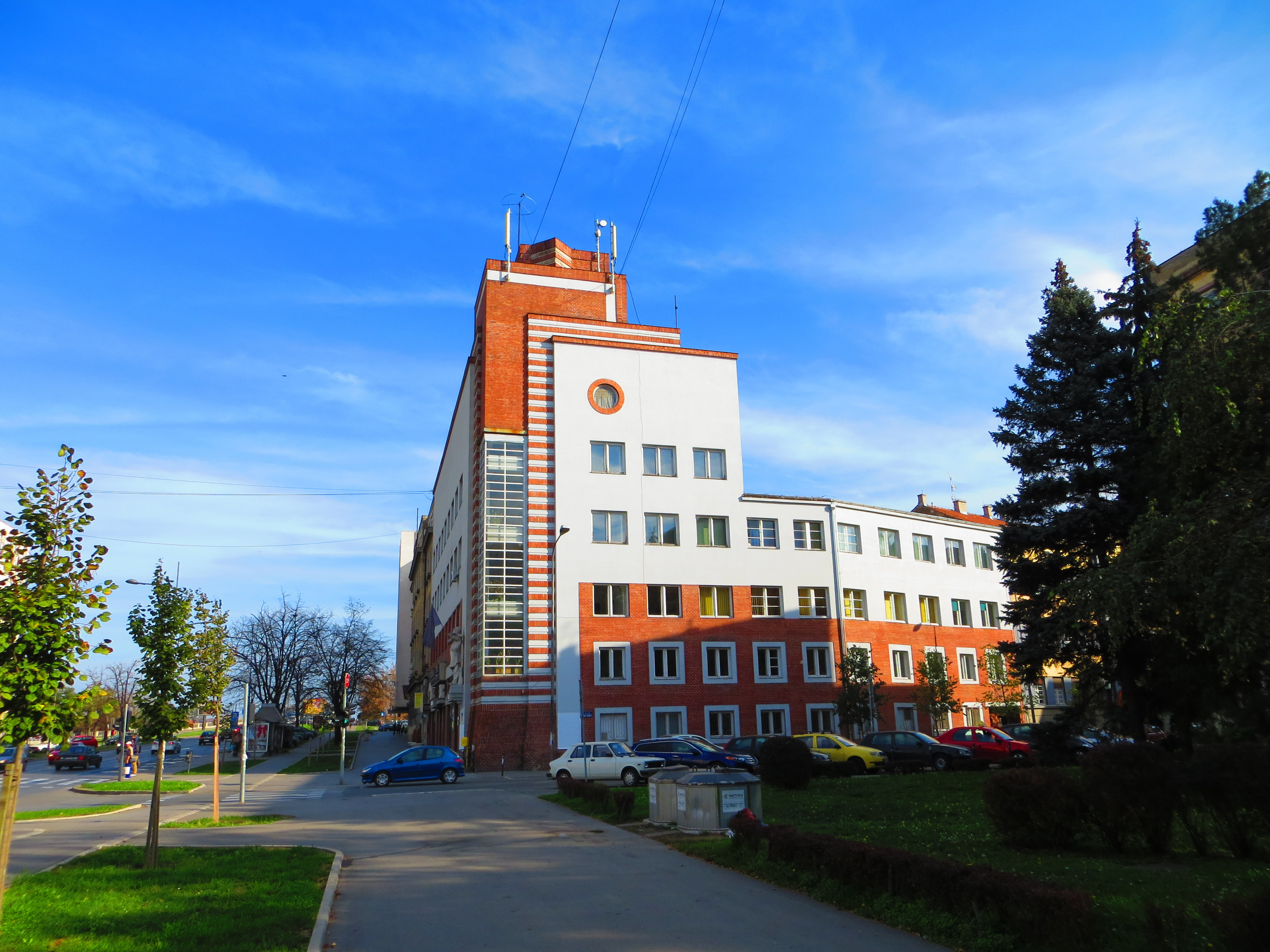 Bulevar Mihajla Pupina